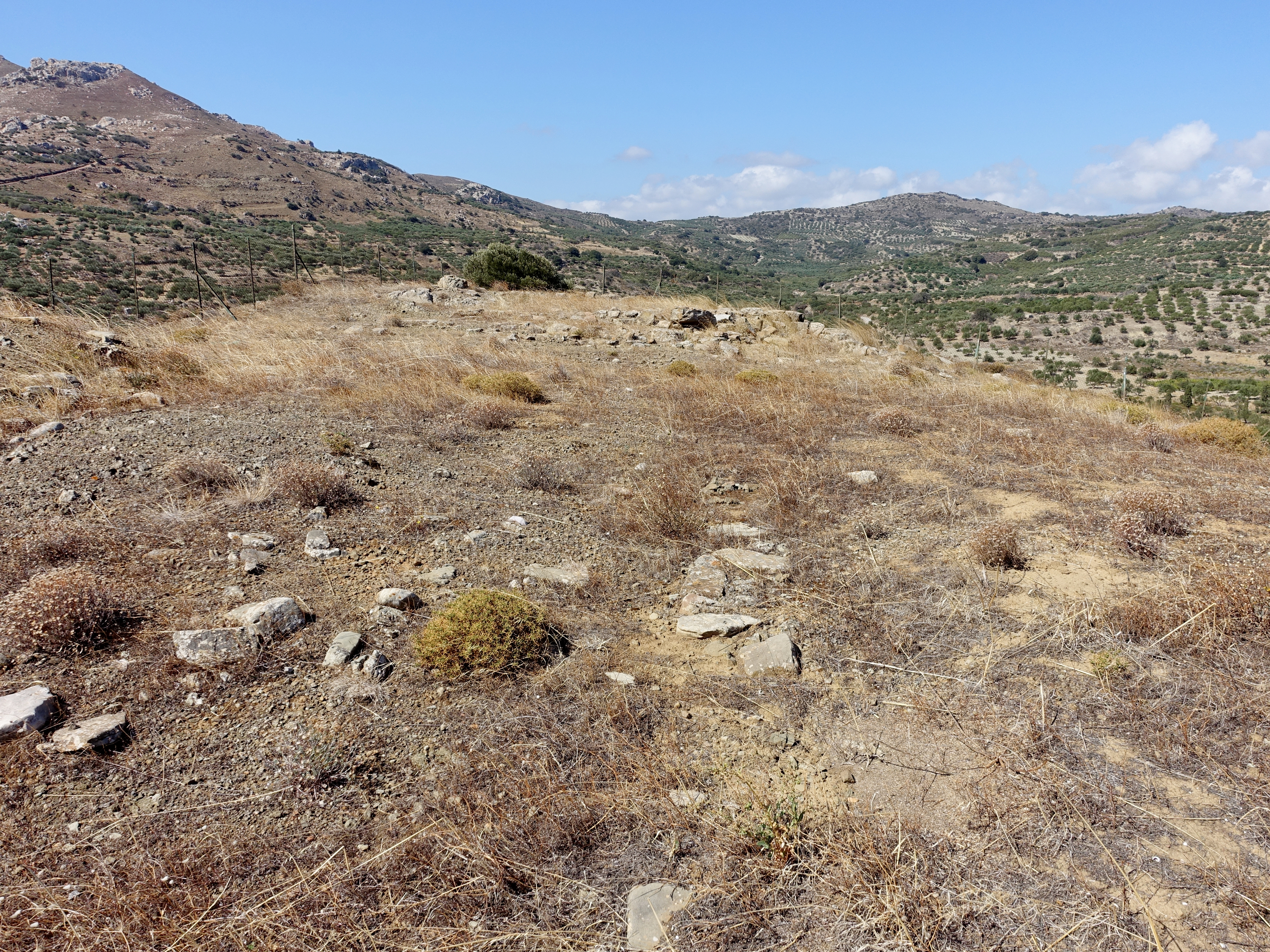 Ausgrabungsstätte von Kephali Lazana (Κεφάλι Λαζανά) bei Chondros (Χόνδρος), Gemeinde Viannos, Regionalbezirk Iraklio, Kreta, Griechenland